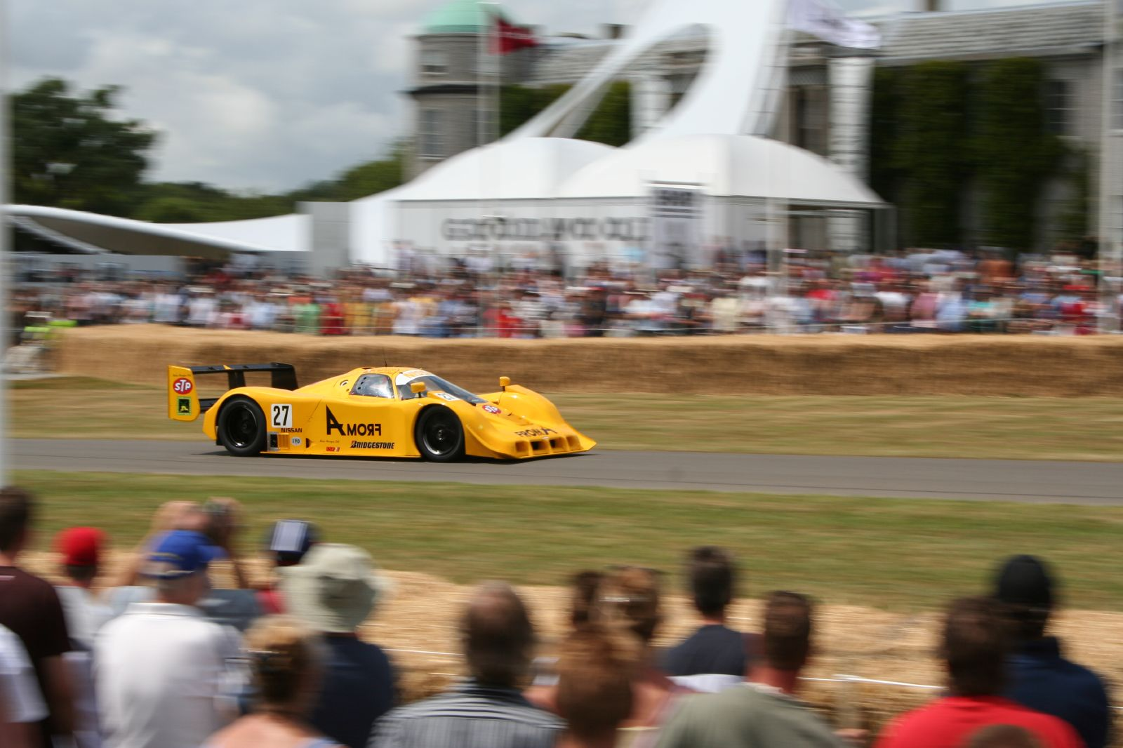 A Nissan R91CK